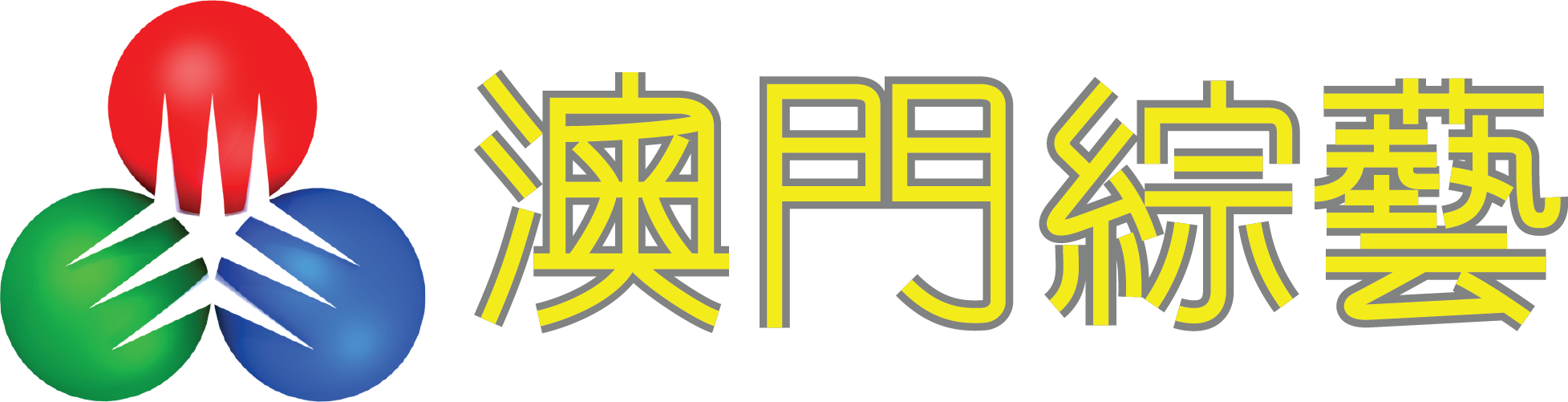 TDM Entertainment